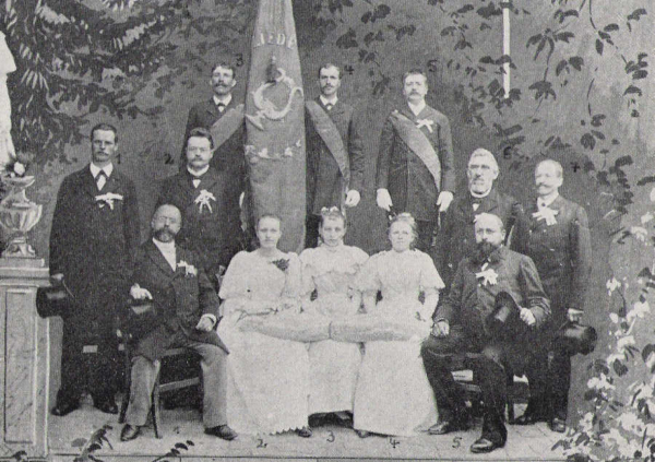 Männergesangsverein 1845 Liederkranz Deidesheim im Jubiläumsjahr 1895. Sitzend: Georg Buscher, Lehrer, Lisa Seel, Maria Leidenheimer, Juliane Leidenheimer, Julius Elbert, Schriftführer Stehend: Martin Seyler, Johann Julius Siben, 1. Vorsitzender, Johannes Habergarten, Otto Brandner, Stephan Glaser, 2. Vorsitzender, Michael Moßbacher